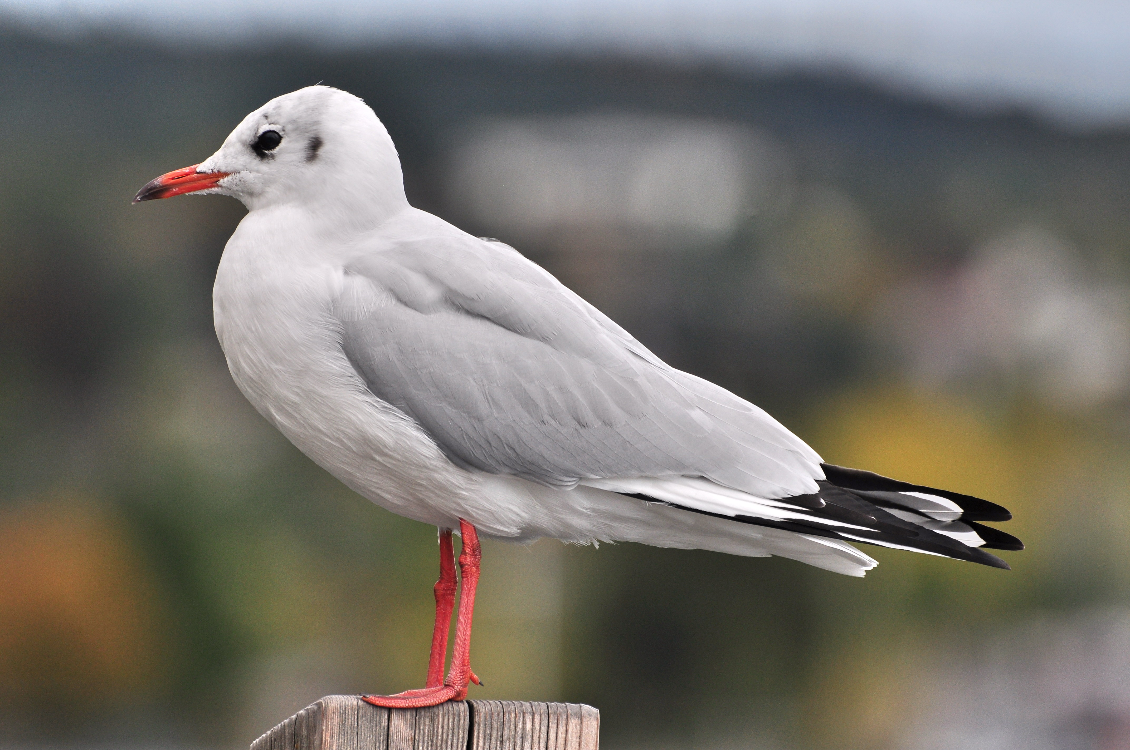 Chroicocephalus ridibundus, Zürichhorn in Zürich-Seefeld (Switzerland)